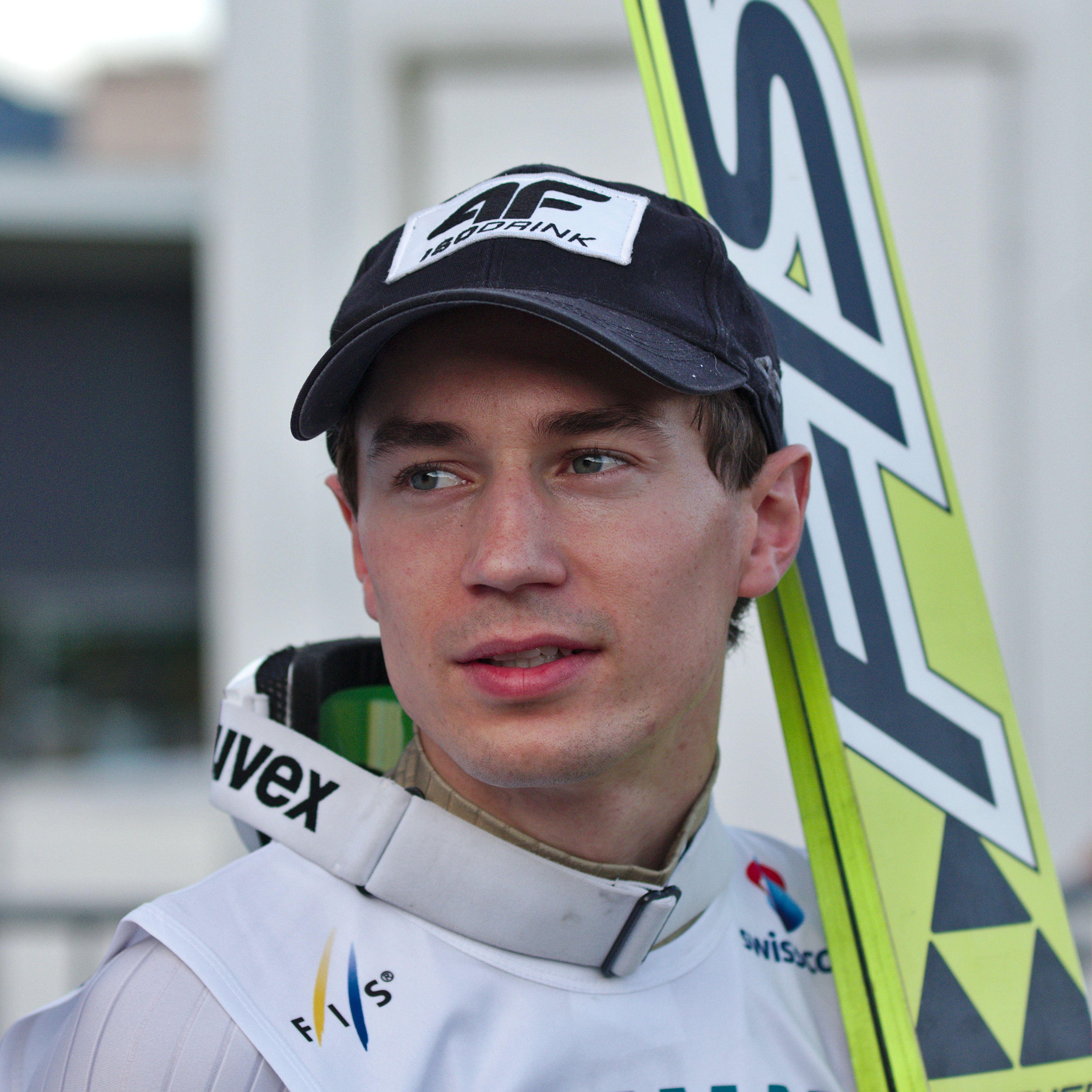 FIS Sommer Grand Prix 2014 - 20140809 - Kamil Stoch